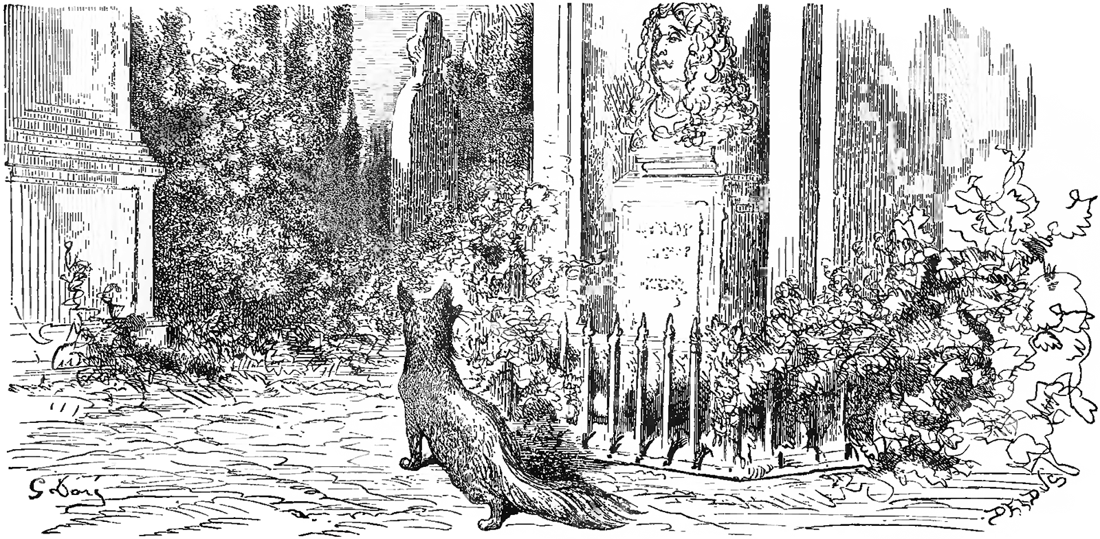 grafika z książki PL Bajki, Jean de La Fontaine, nakładem i drukiem Jana Noskowskiego, Warszawa 1876